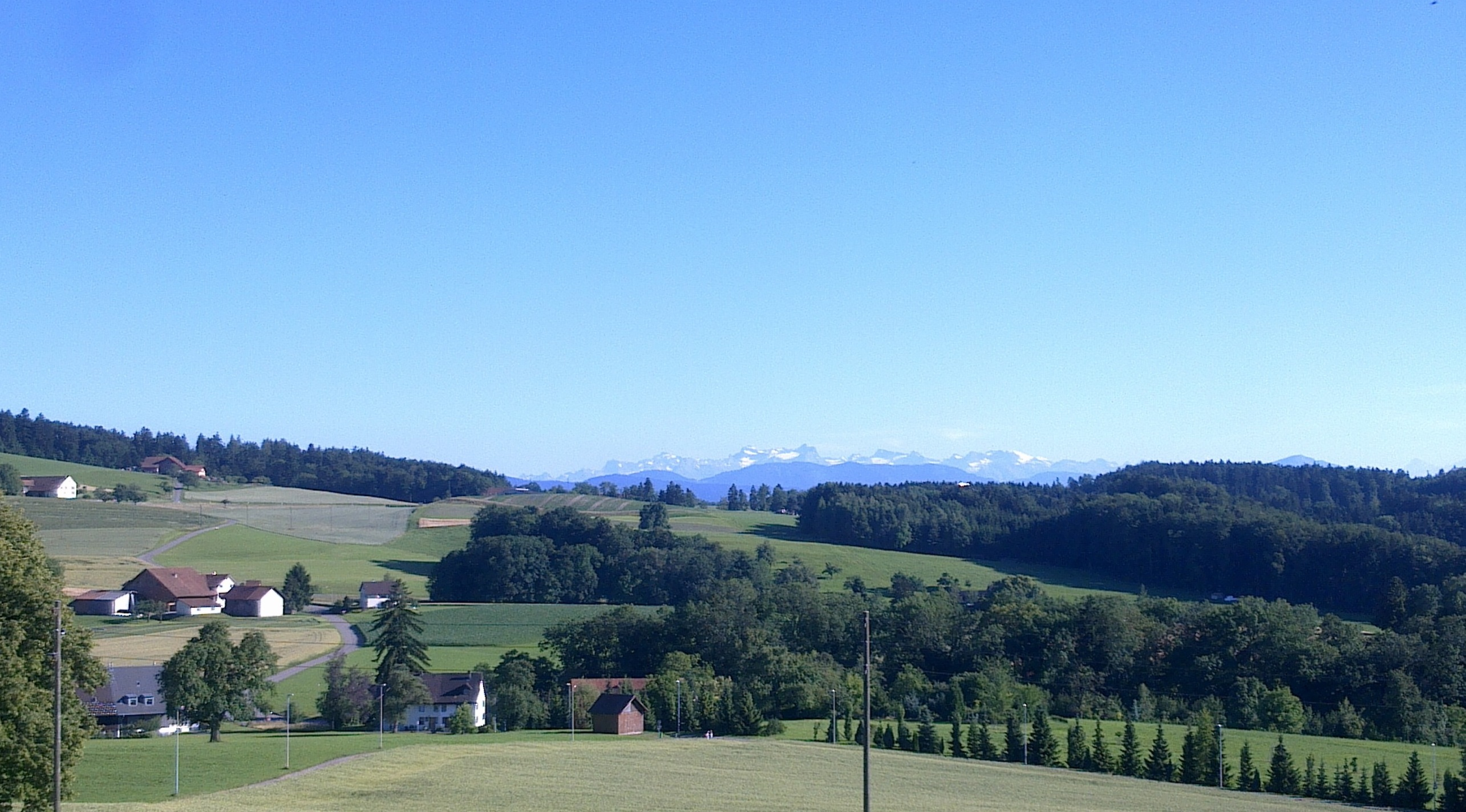 Küsnacht ZH Blick von der Neuen Forch Richtung Süden über den Küsnachterberg